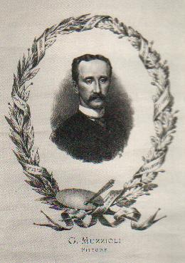 fonte: sito creato da me stesso descrizione: autoritratto di Muzzioli G. note: il pittore Giovanni Muzzioli